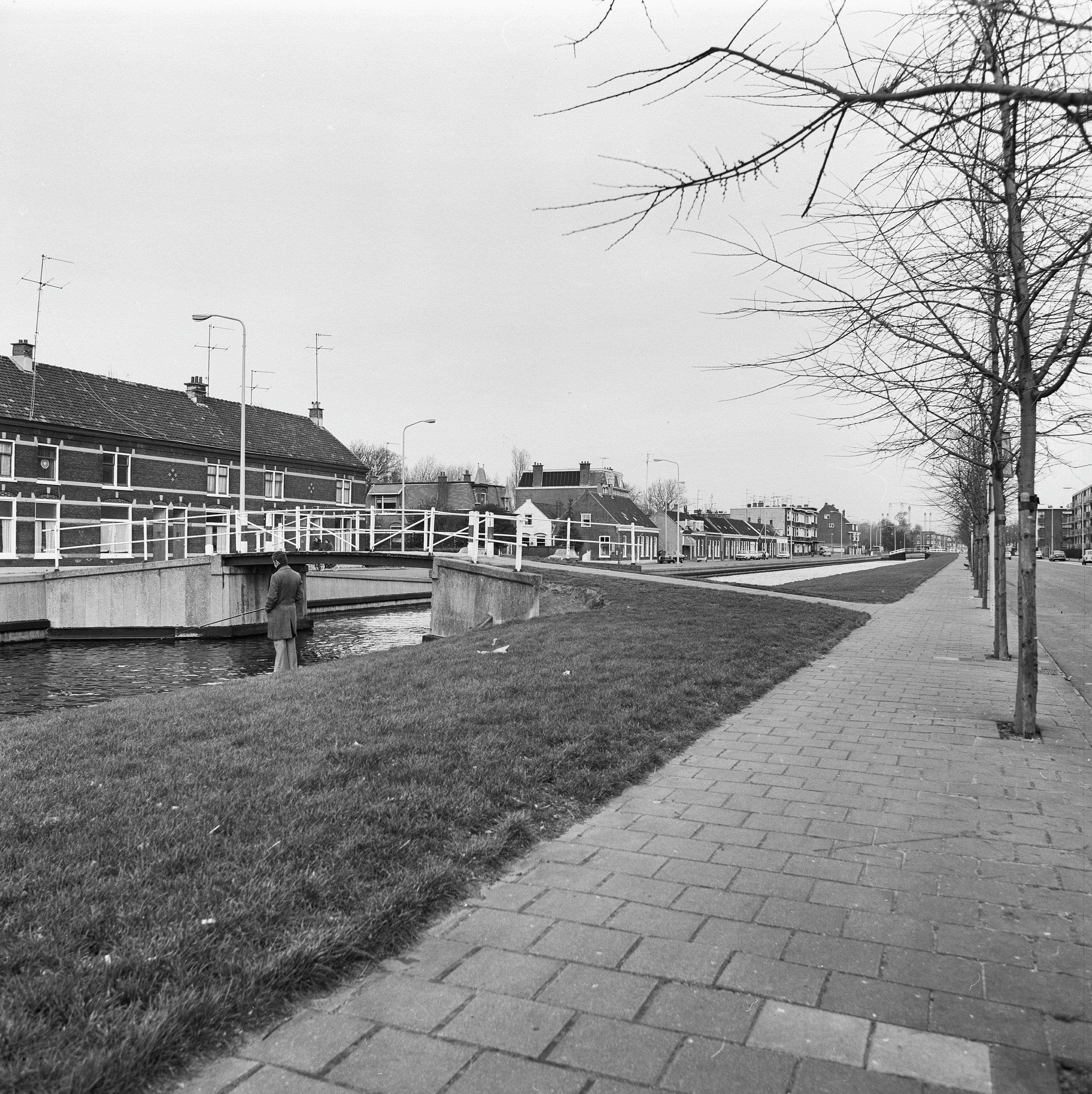 overzicht